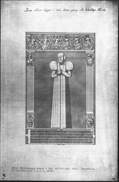 Gravsten, teckning efter Hilfelings manus i Det Kongelige Bibliotek, Köpenhamn. Kategori: (09) VapenGravsten, teckning efter Hilfelings manus i Det Kongelige Bibliotek, Köpenhamn.